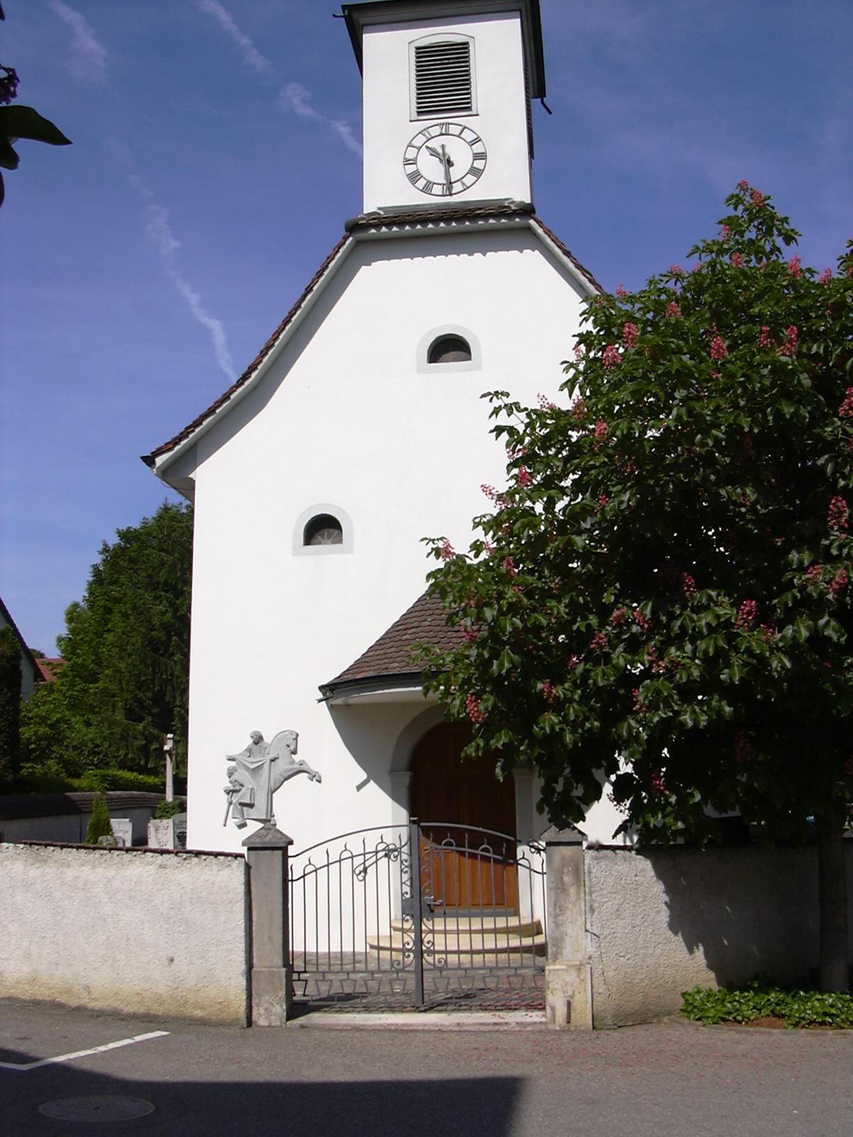 Die Kapelle Sankt Martin (bis 1791 Herz-Jesu-Kapelle) wurde von 1744 bis 1755 erbaut. Zusammen mit Witterswil bildet Bättwil seit 1808 eine eigenständige Doppelpfarrei. Die Mühle von Bättwil stammt aus dem 15. Jahrhundert; sie wurde nach einem Brand 1976 in der originalen Form wieder aufgebaut. Entlang der Hauptstrasse stehen das Gemeindehaus (aus der Zeit um 1600) und die alte Post (um 1730) sowie eine Reihe charakteristischer Bauernhäuser aus dem 16. und 17. Jahrhundert.